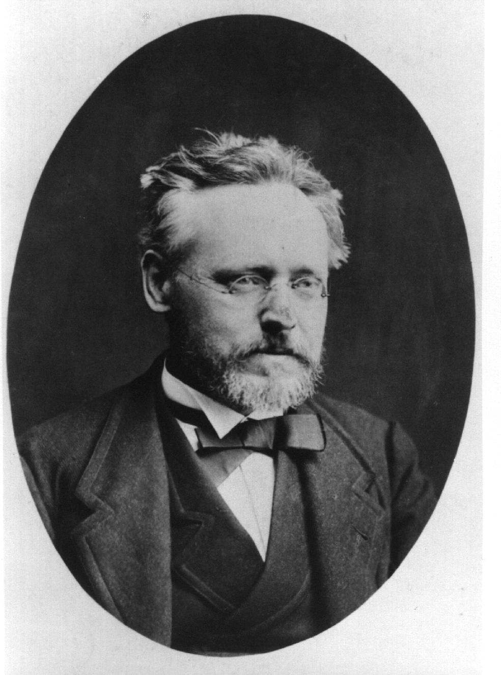 Sophus Mads Jørgensen (1837-07-04 - 1914-04-01), Danish chemist